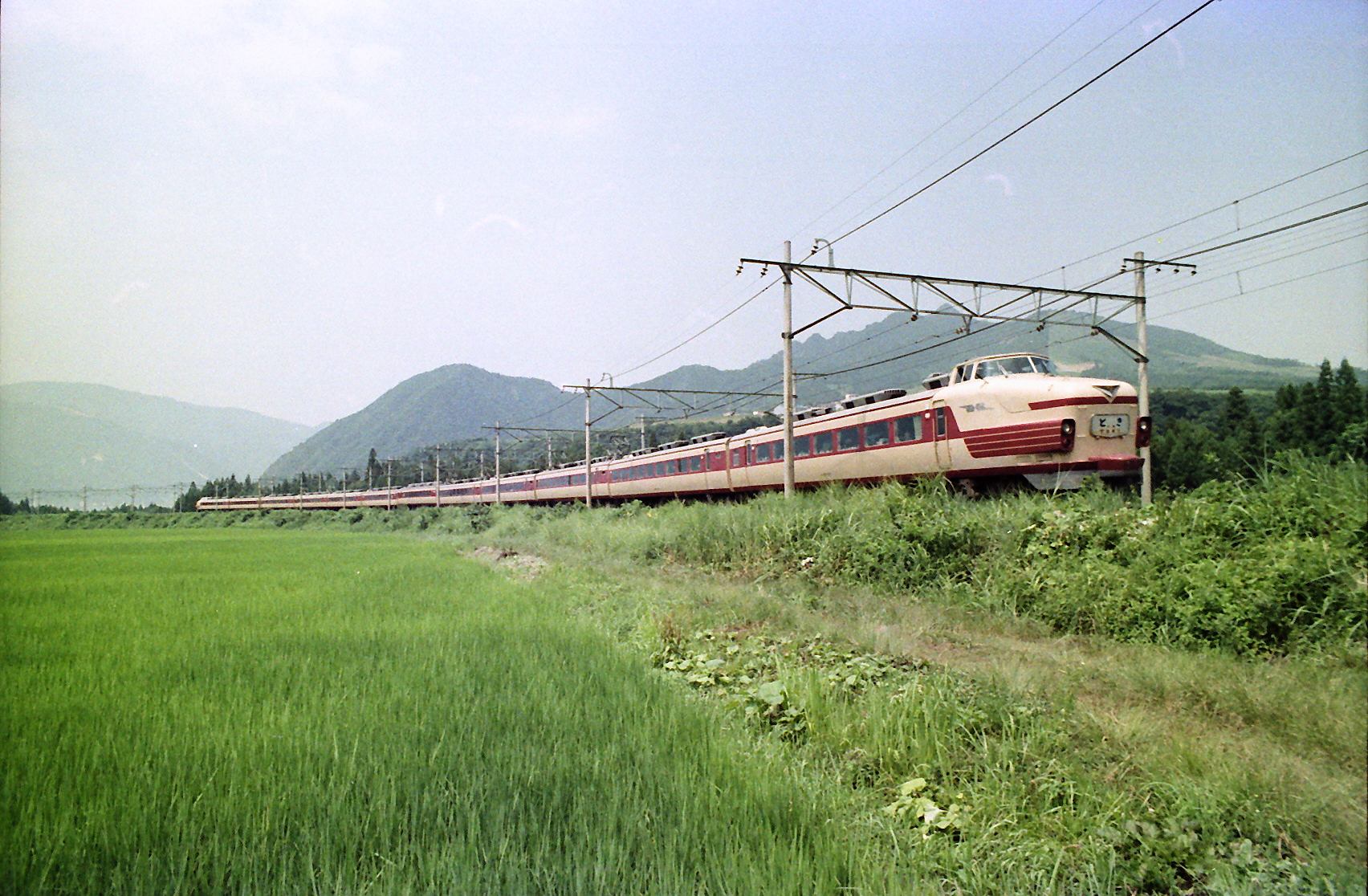 181系 特急 「とき」 上越線 越後中里駅-岩原スキー場前駅 新潟県南魚沼郡湯沢町大字土樽